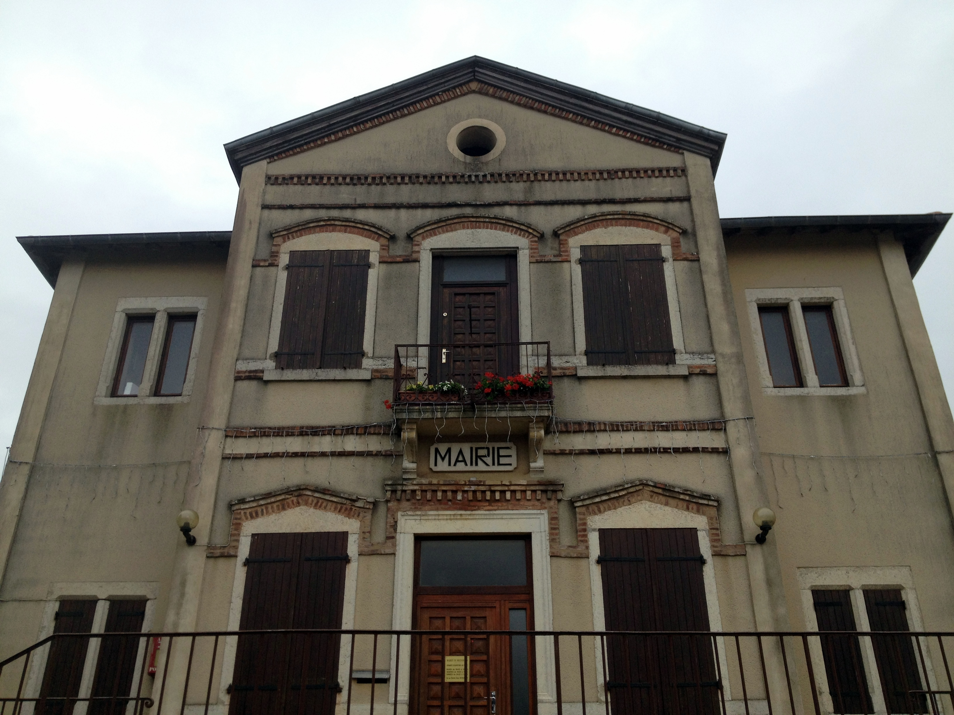 Mairie de de Bressolles (Ain).